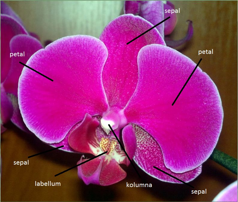 Popis anatomie květu